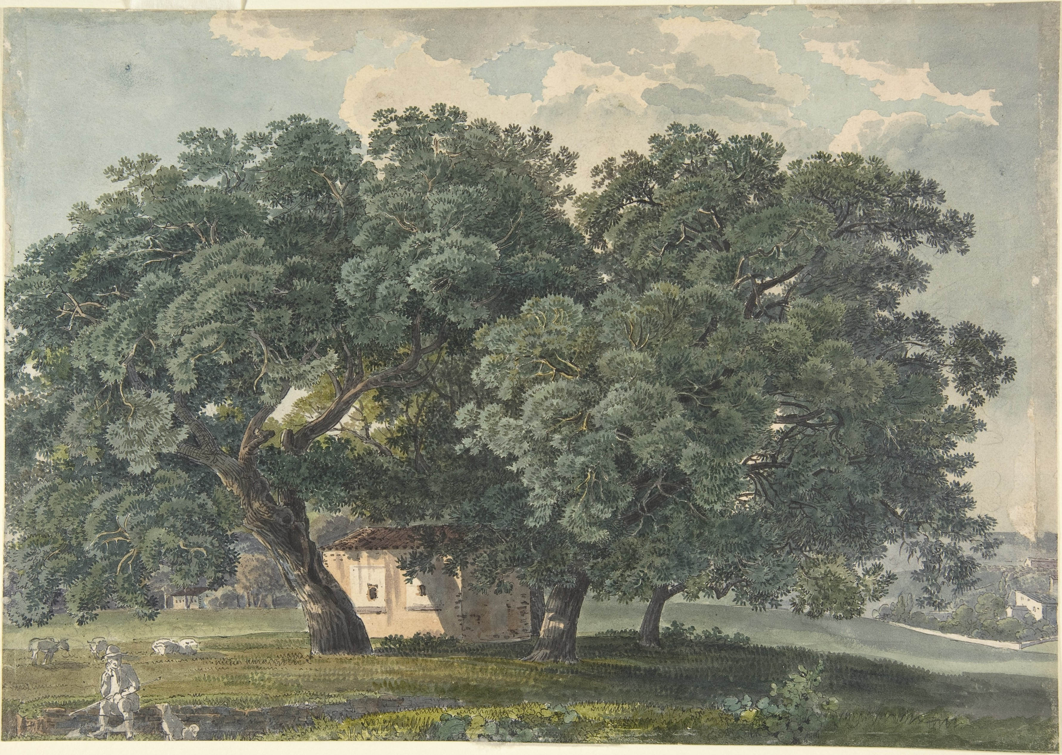 Drawing; Drawings